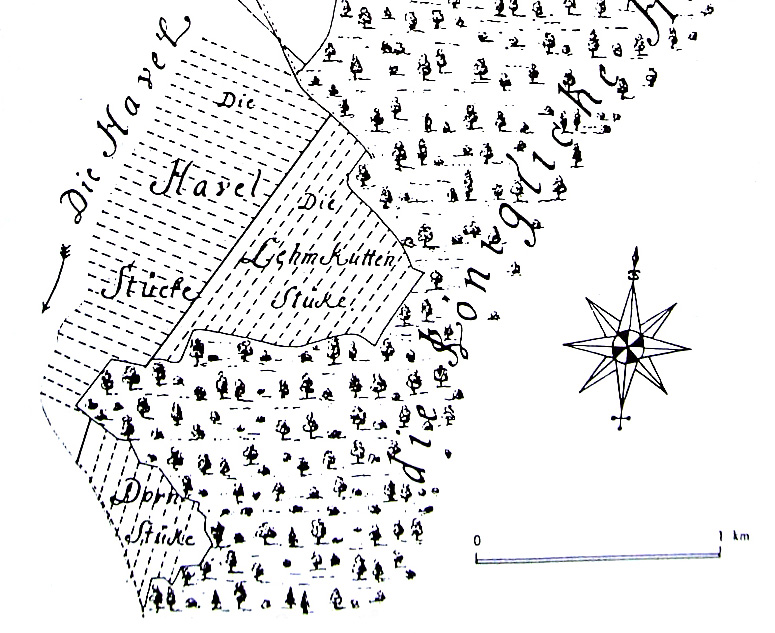 Carte von der Feldmarck Heiligensee, Maßstab 1:5000